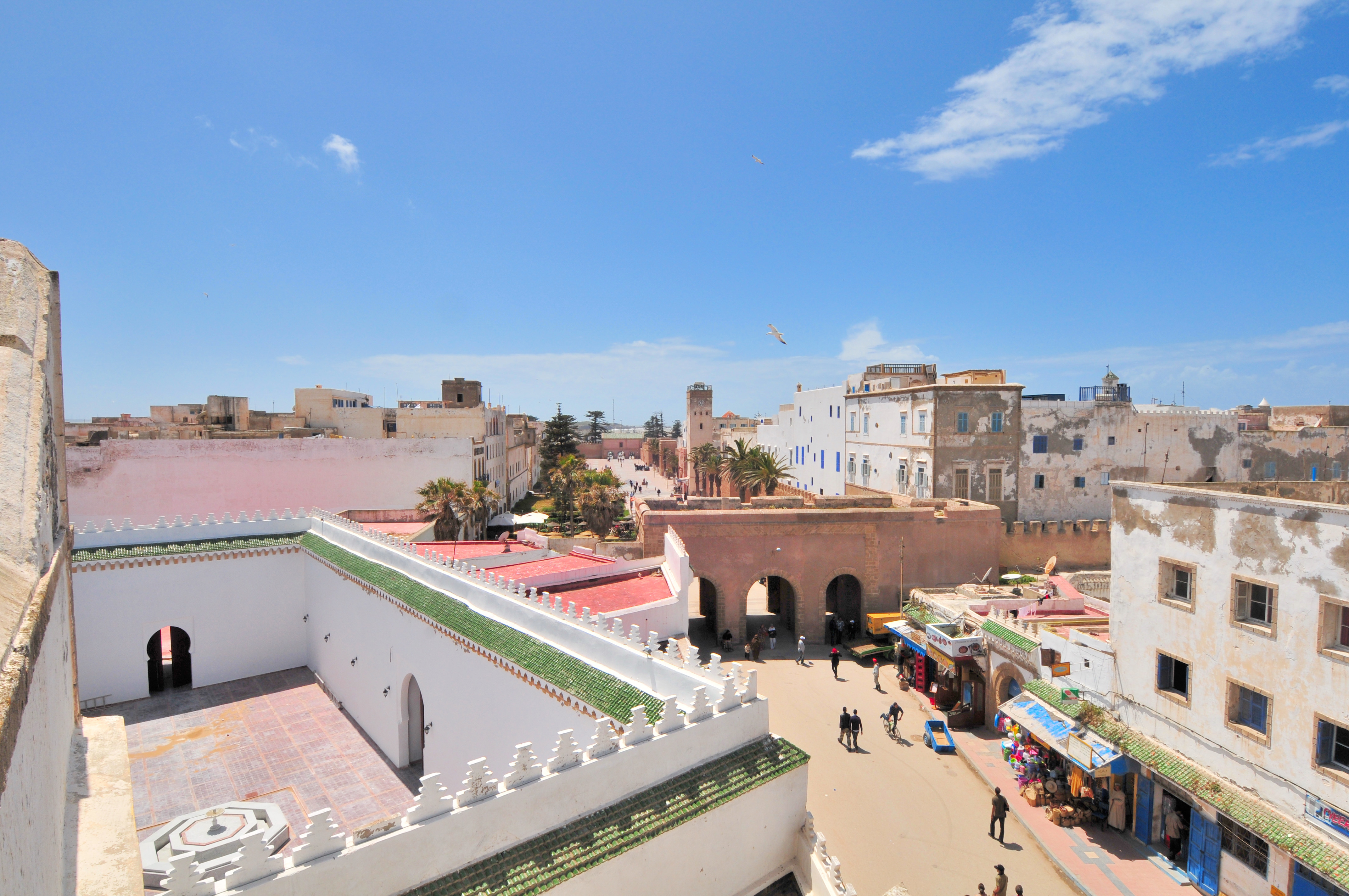 Vue d'Esaouira (Maroc)